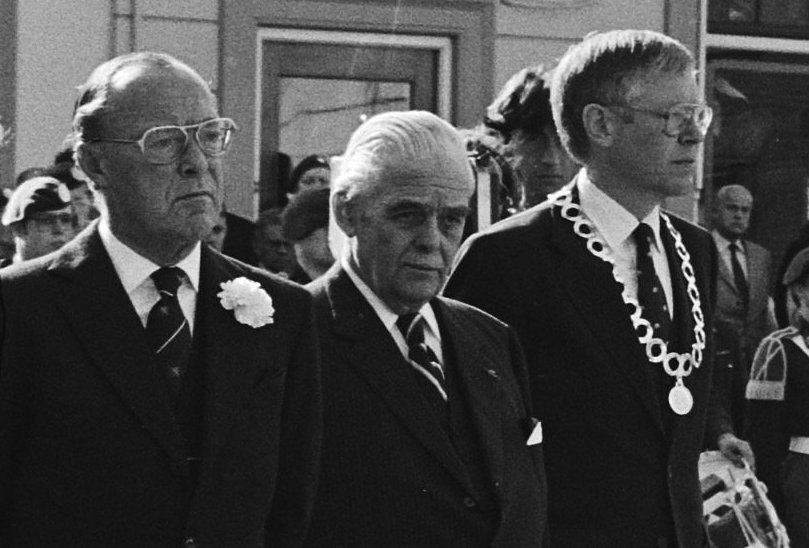 Prins Bernhard legt een krans bij het Nationaal Bevrijdingsmonument voor Hotel de Wereld in Wageningen; v.l.n.r. prins Bernhard, Molly Geertsema (Commissaris der Koningin Gelderland) burgemeester Jan Dirk van Ketwich Verschuur